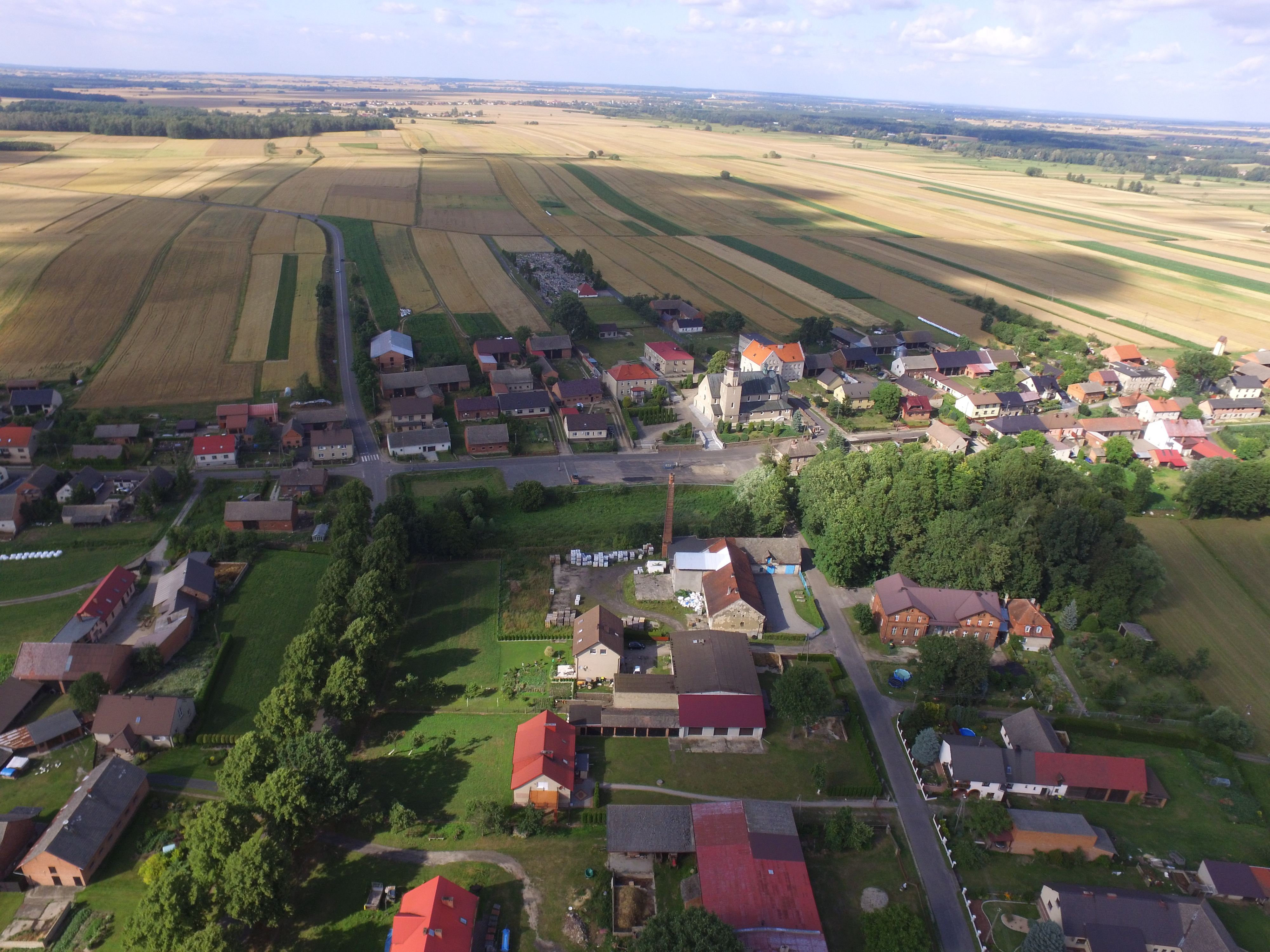 Centrum wsi Bodzanowice z widocznymi zabudowaniami kościoła pw. Narodzenia Najświętszej Marii Panny, oraz gorzelni